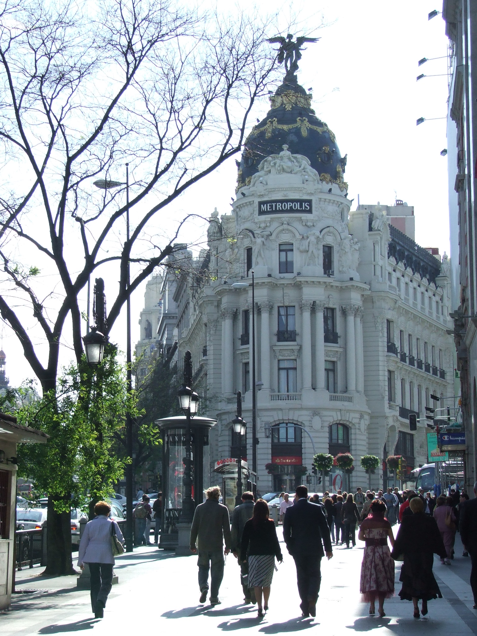 Madrid. Calle de Alcalá.